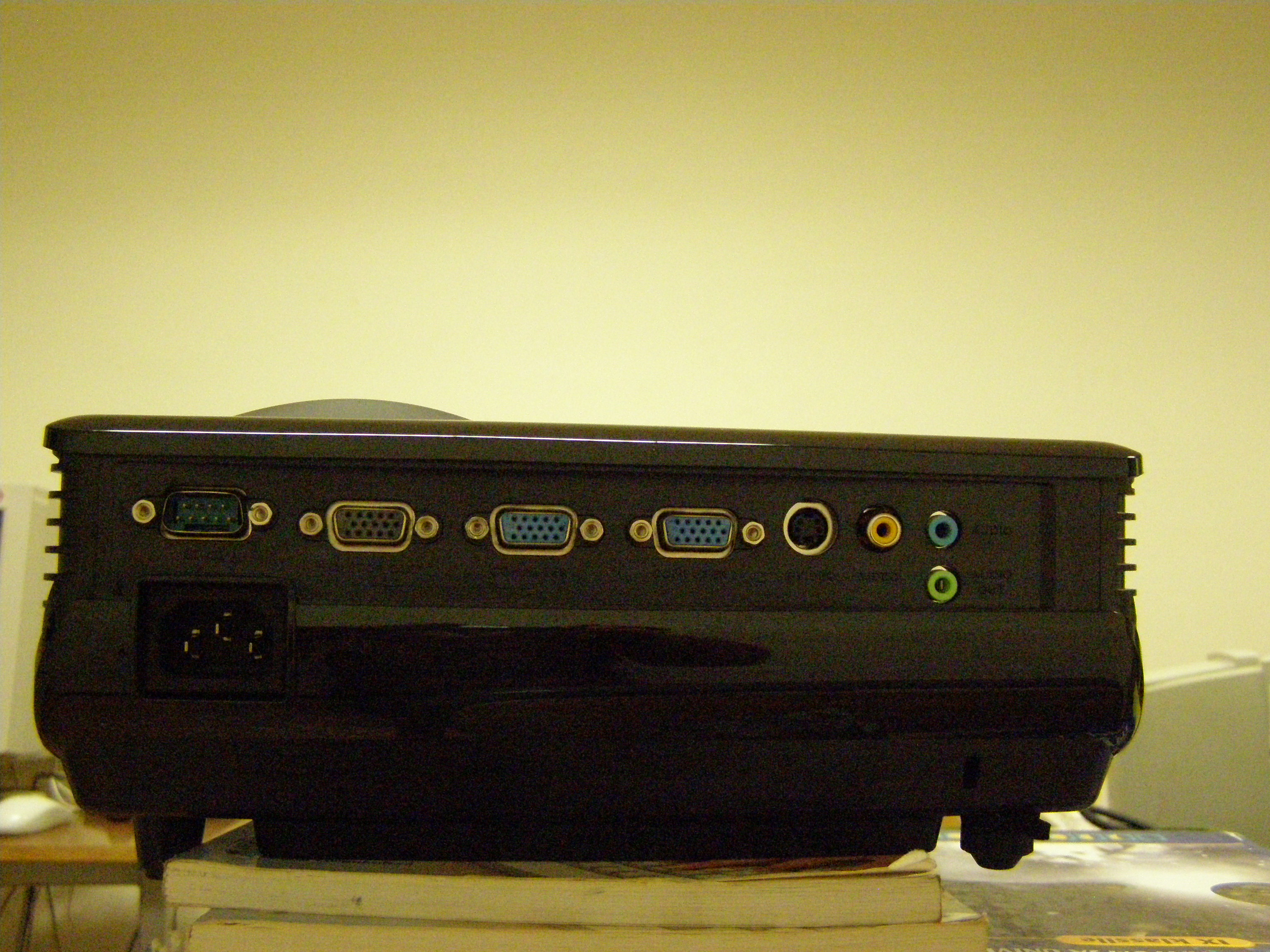 DLP-projektor tagantvaates